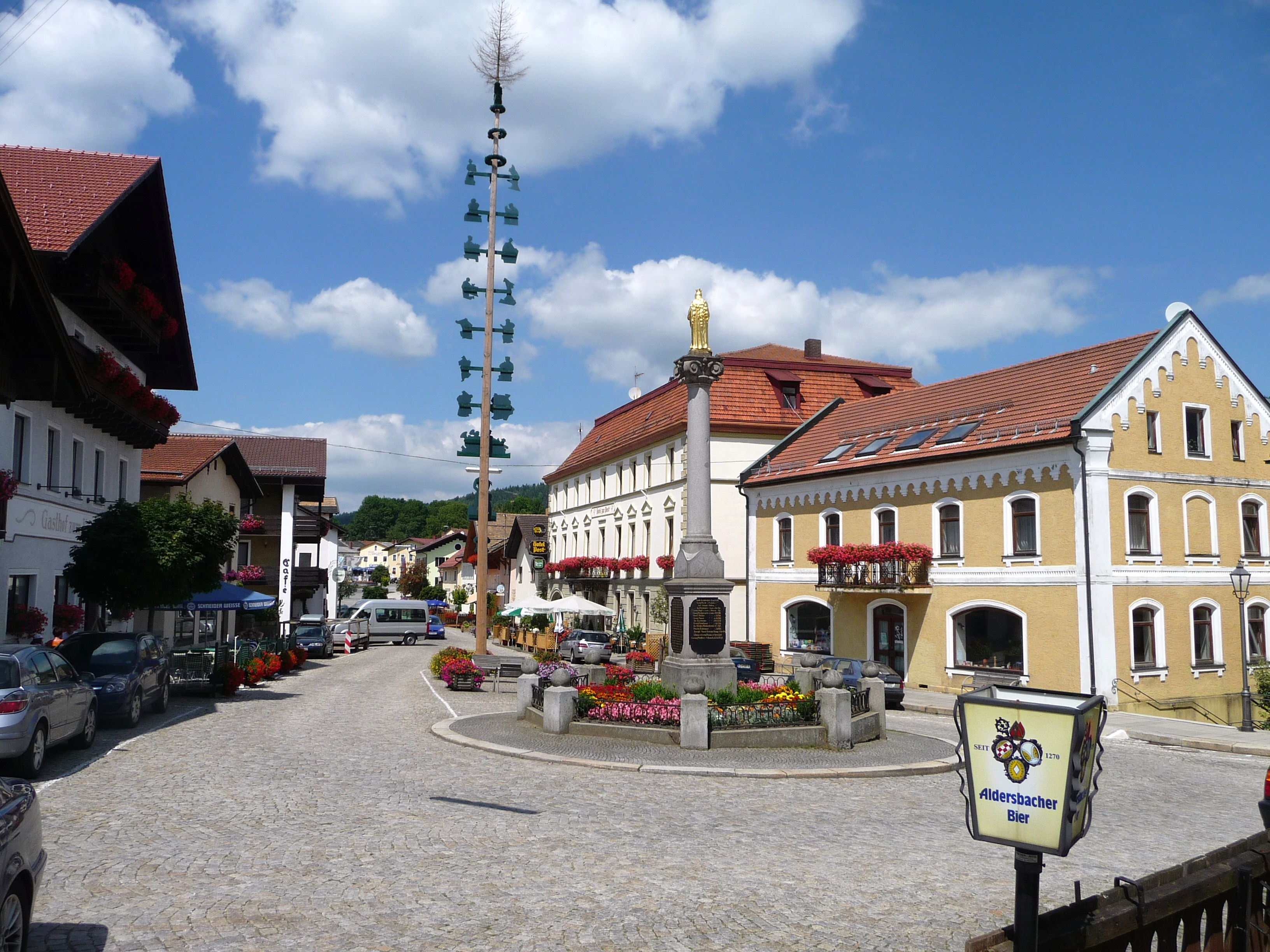 Der Marktplatz in Lam